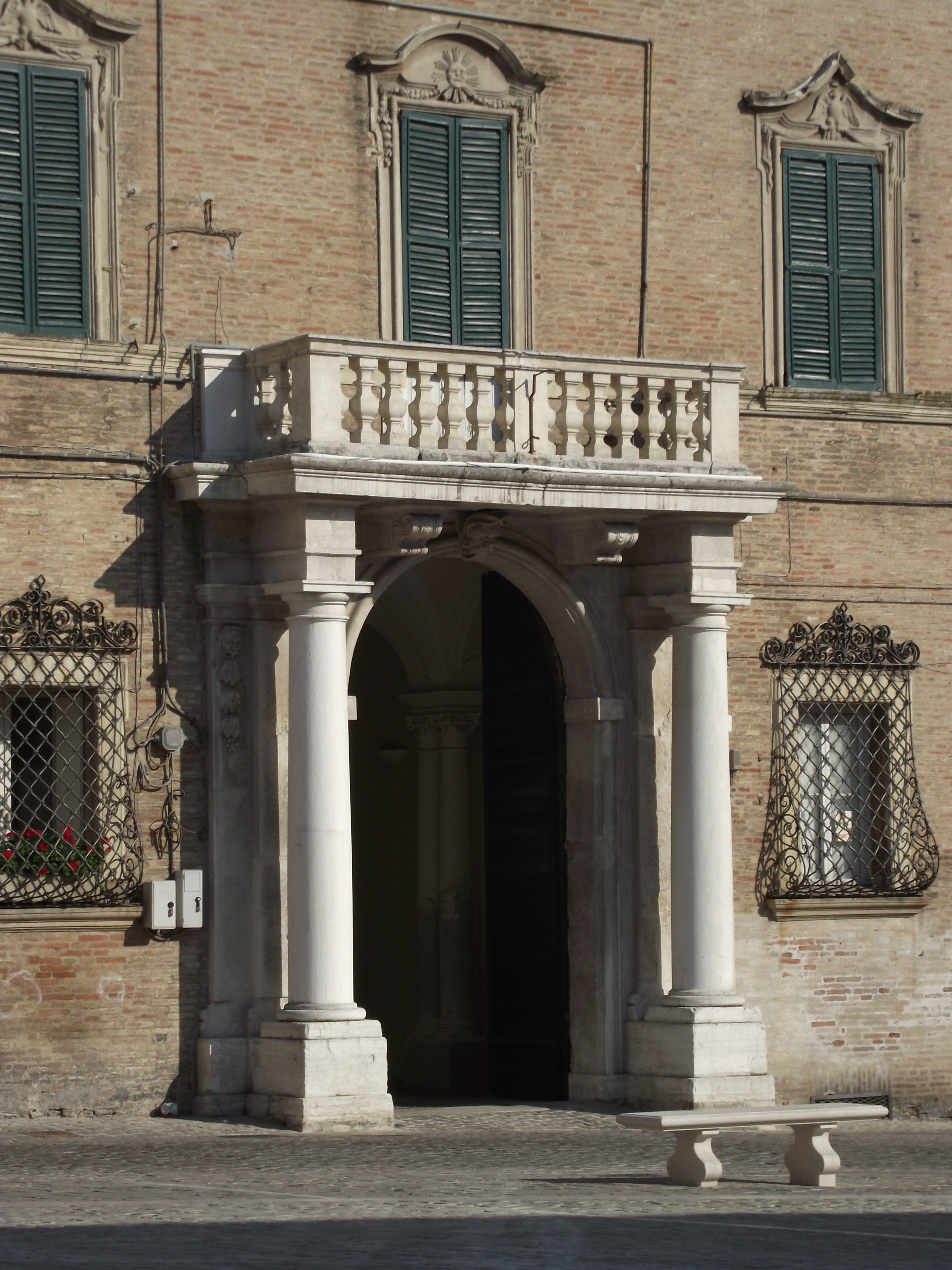 portale d'ingresso